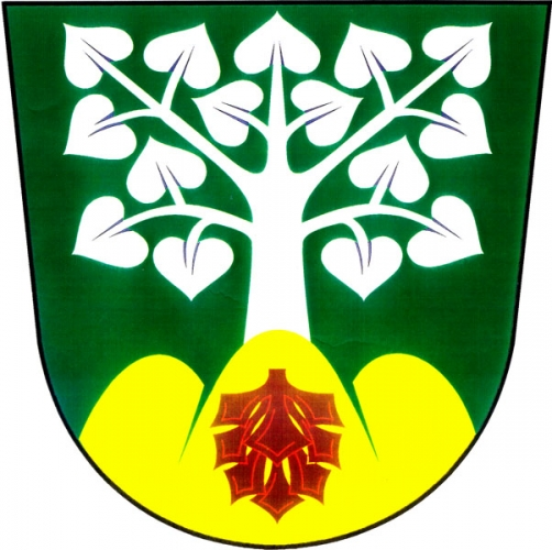 Znak, Zborov, okres Šumperk